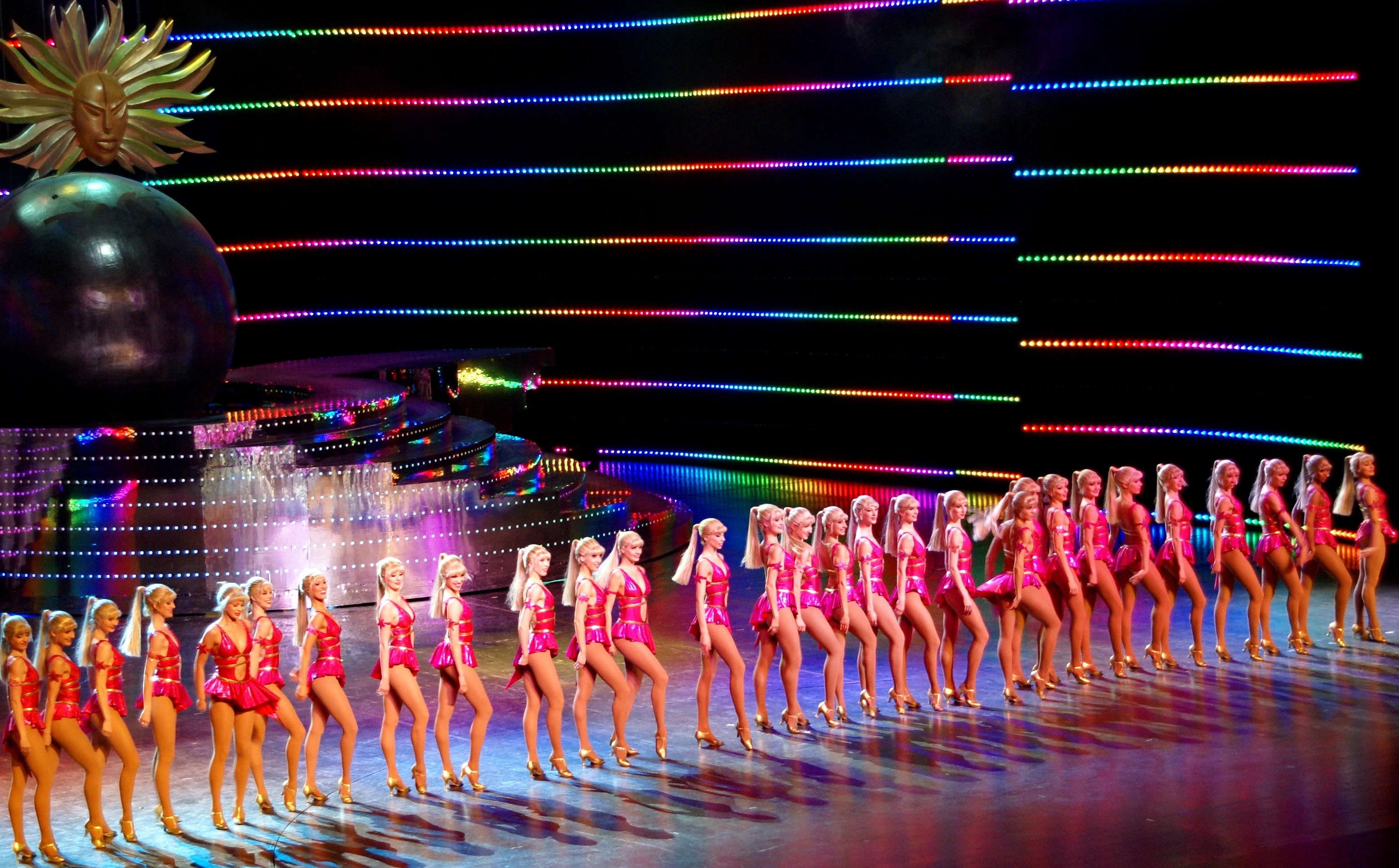 Revue im Friedrichstadt-Palast 2010, Berlin